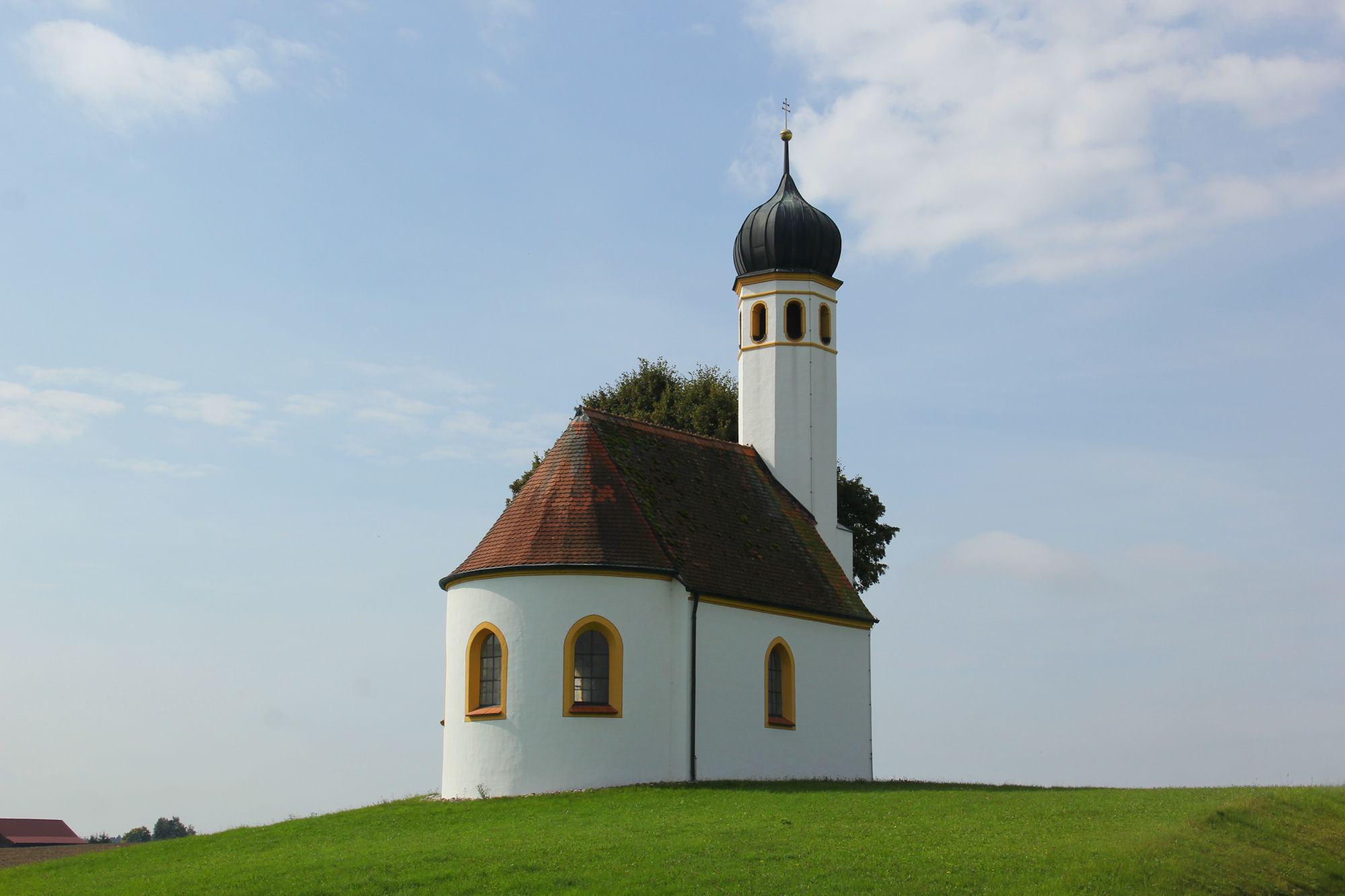 Moorenweis, Bavaria, Germany